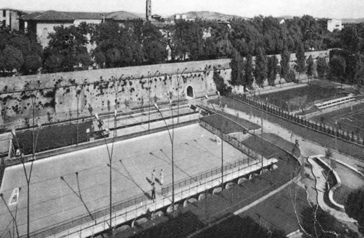 Circolo Pattinatori Grosseto 1951